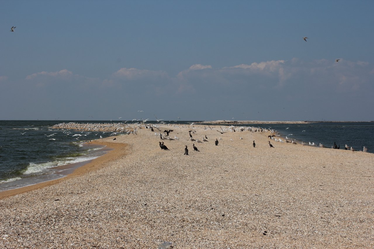 Птицы на островах косы Долгая, в основном чайки и бакланы. На фото вид в сторону островной части косы, слева Азовское море, справа Таганрогский залив.